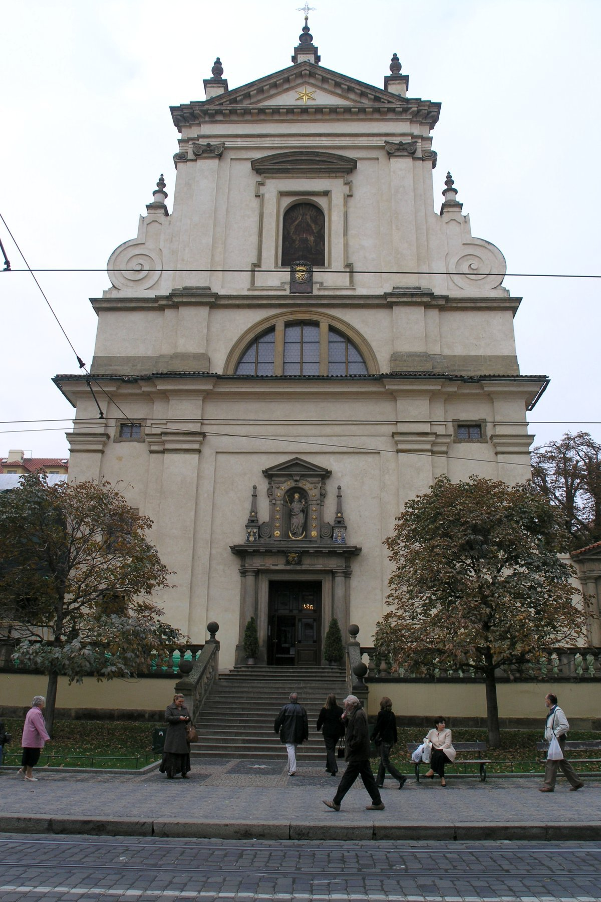 Kostel Panny Marie Vítězné (Praha, Malá Strana, Karmelitská 9)